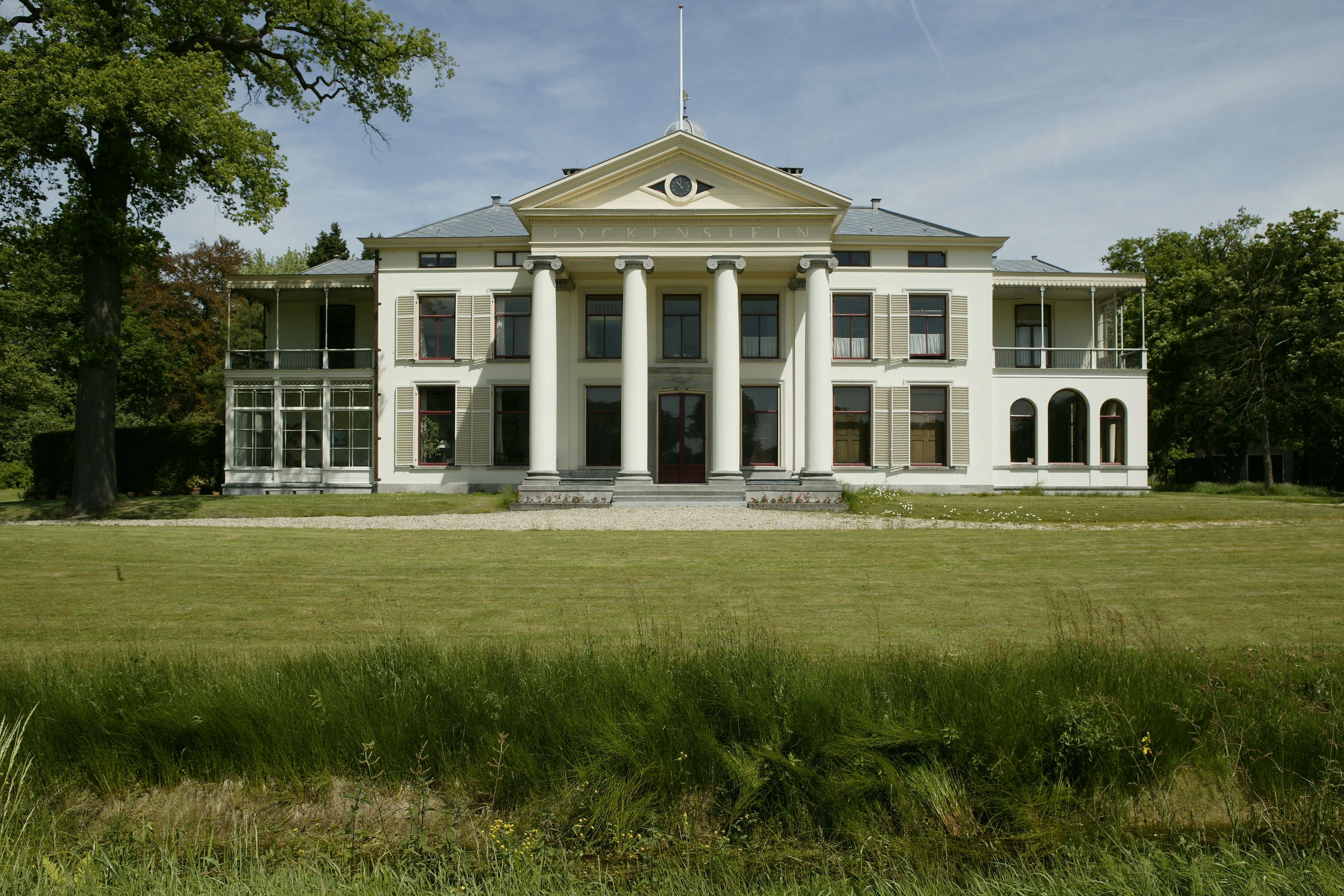 Huis Eyckenstein: Overzicht van de voorgevel van het hoofdgebouw met zuilenportiek (opmerking: Foto's verkregen uit privé-collectie van fotograaf P. van Galen.)